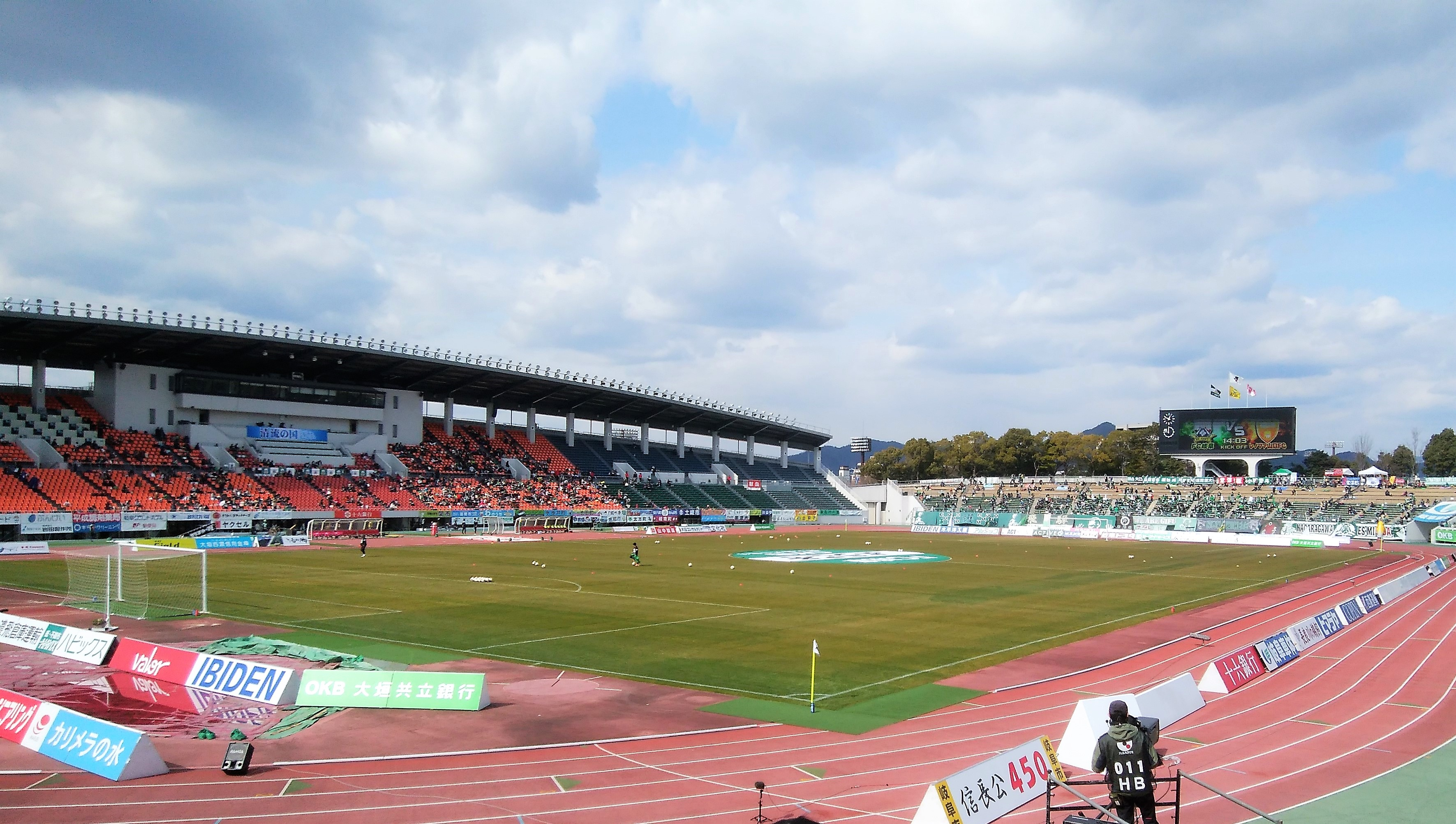 岐阜メモリアルセンター長良川競技場